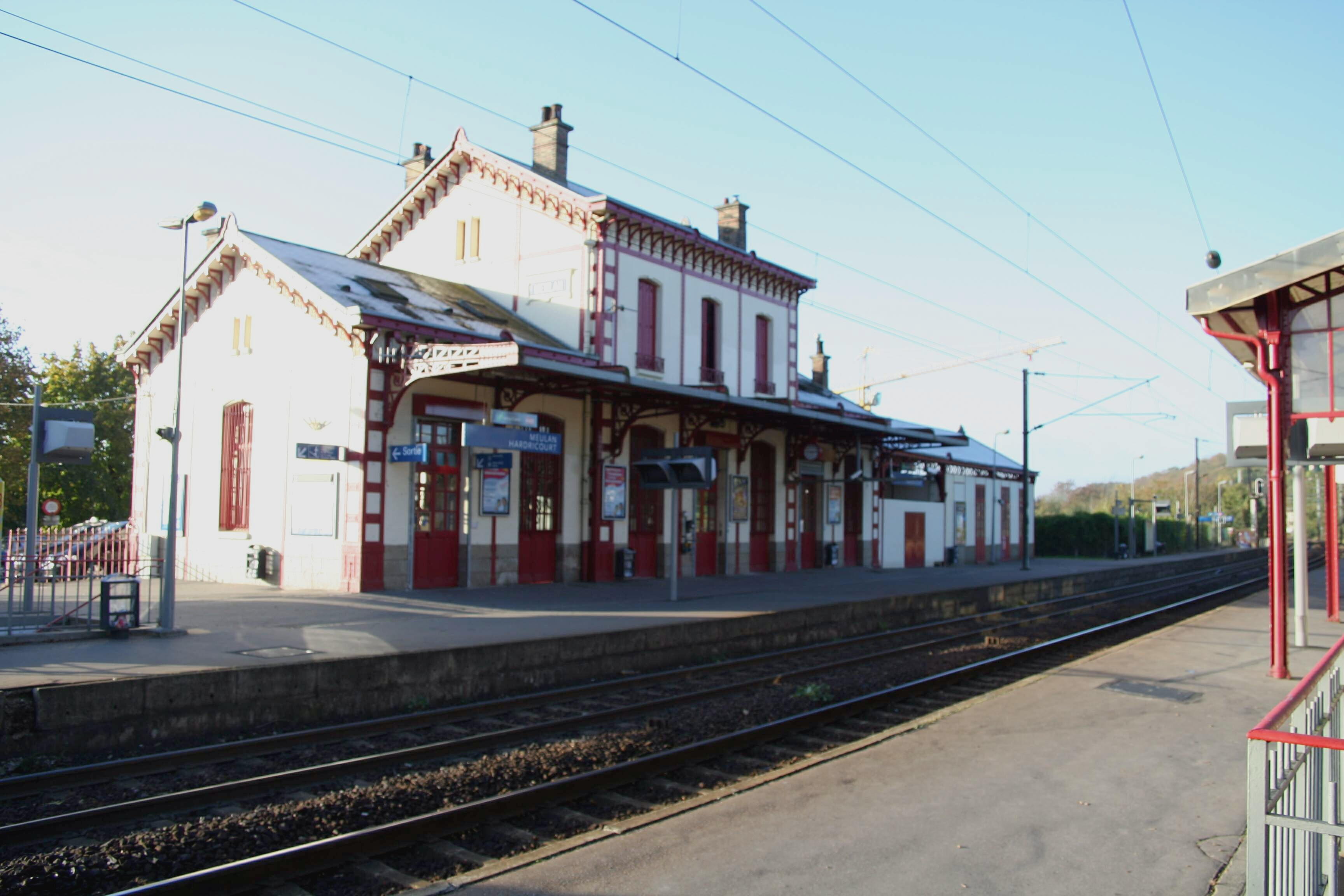 Gare de Hardricourt - Yvelines (France)